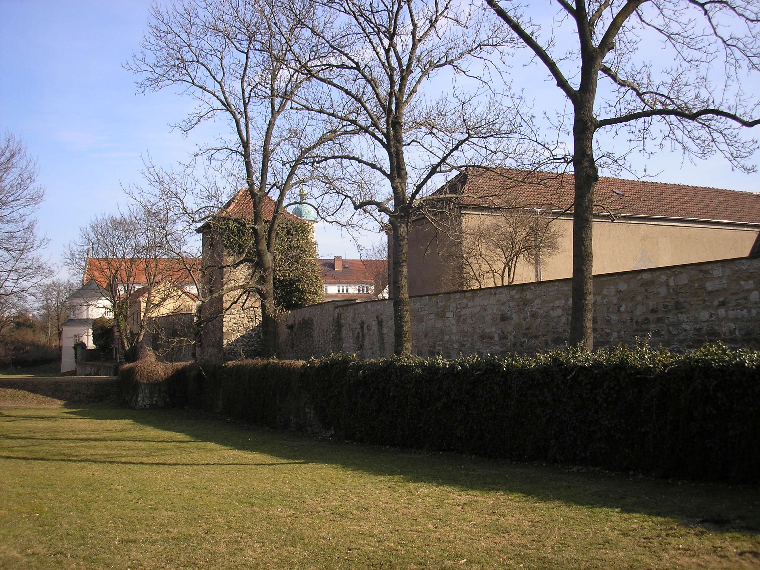 Die Stadtmauer östlich der Erfurter Straße in Arnstadt (Thüringen).